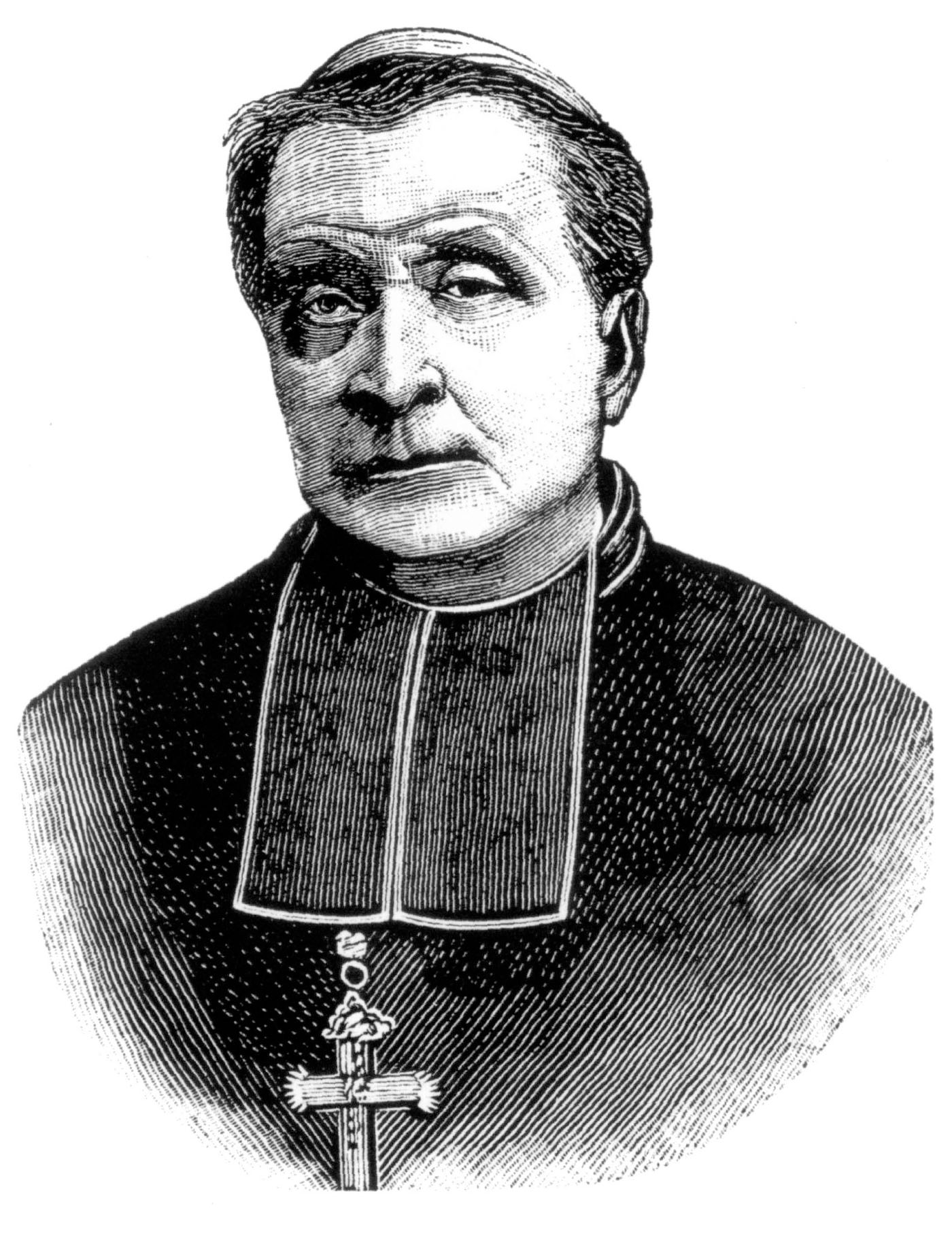 Portrait du cardinal Boyer archevêque de Bourges, vue du col & collet